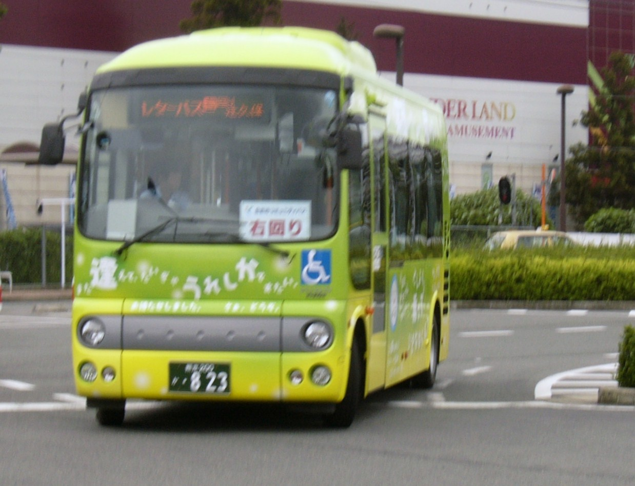 熊本電気鉄道（レターバス）